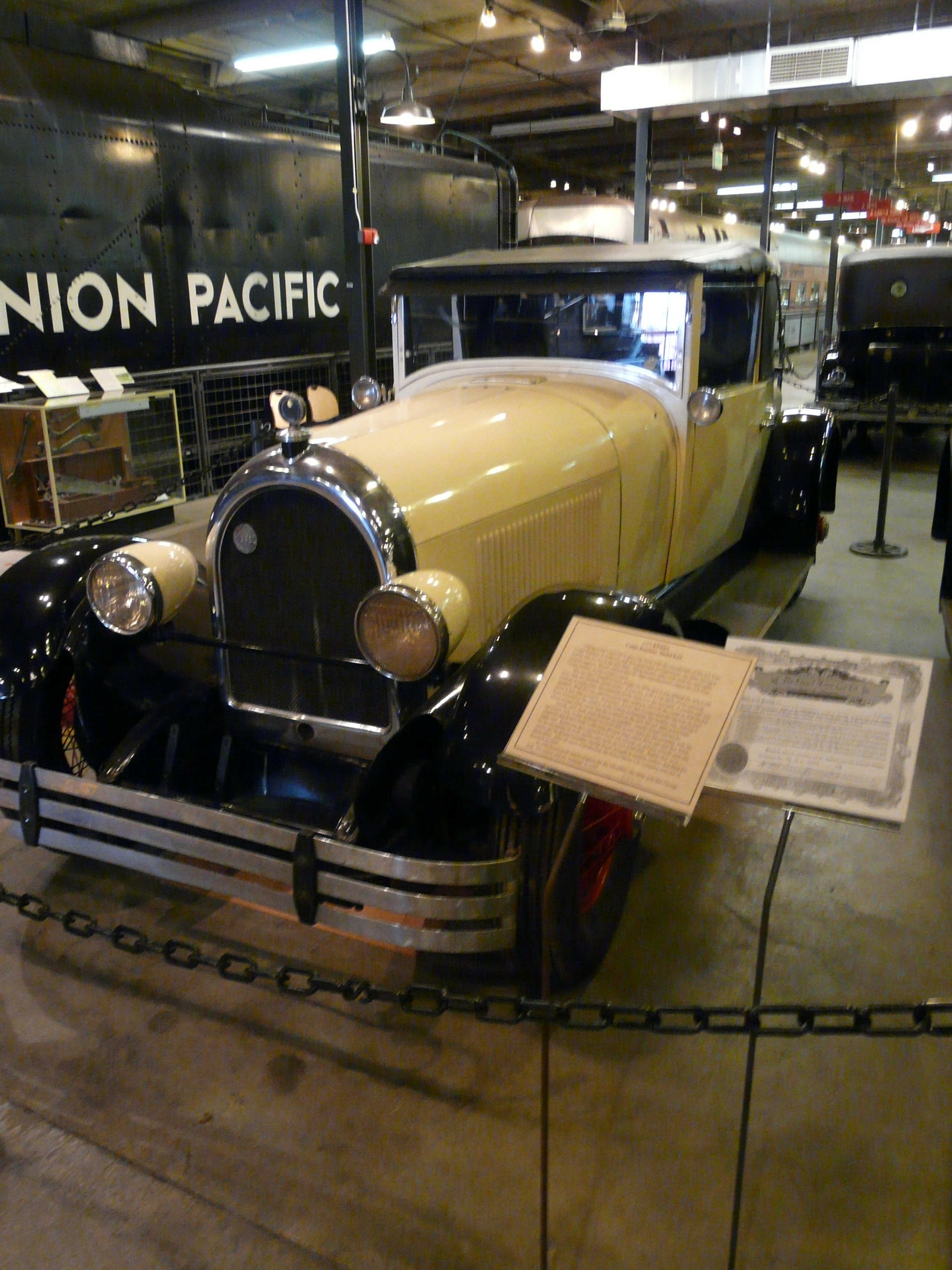 1922 Kissel convertible coupe. Denver, summer 2012